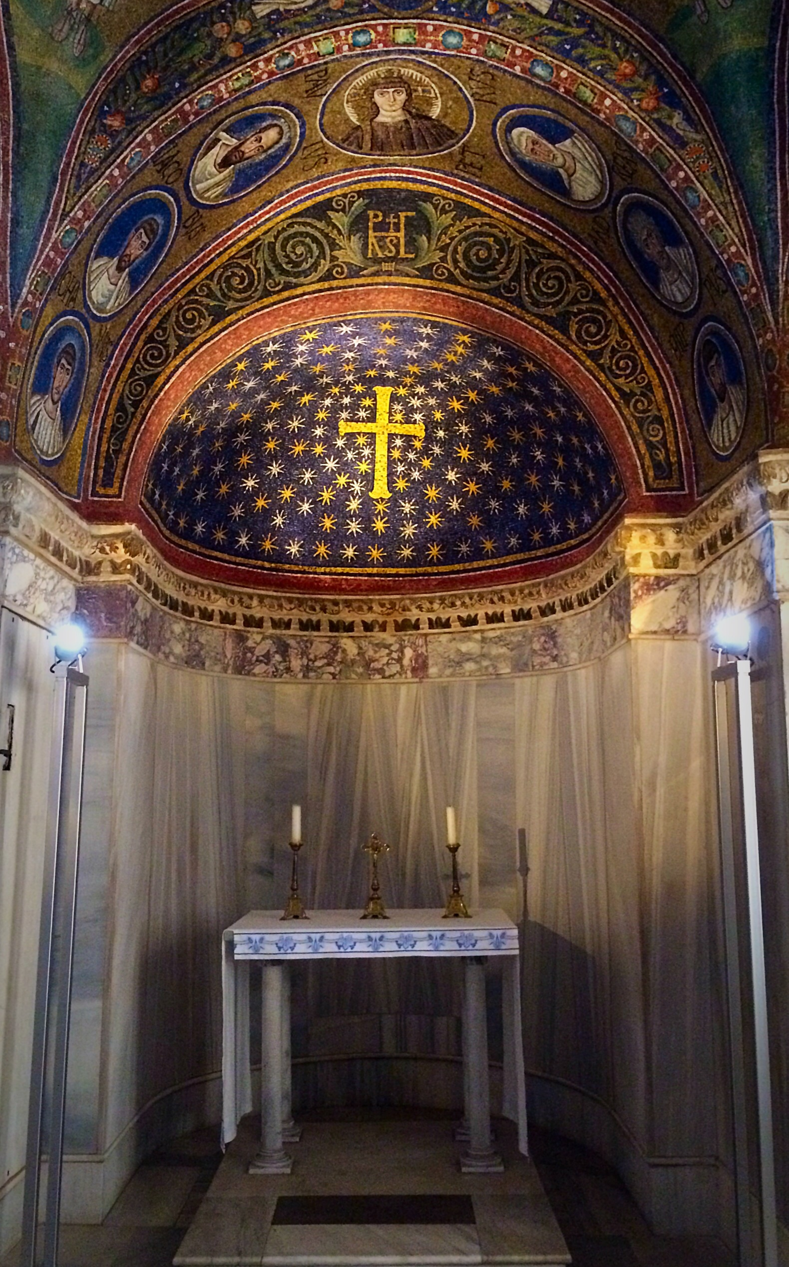 Архиепископская капелла (Равенна)